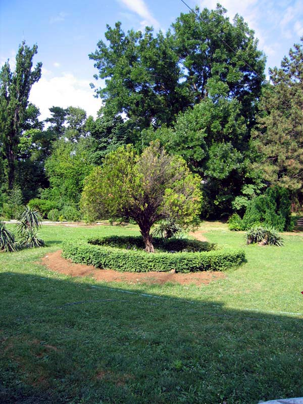 Description:Botanicka basta Jevremovac u Beogradu author: Snezana Trifunovic Source: self-made